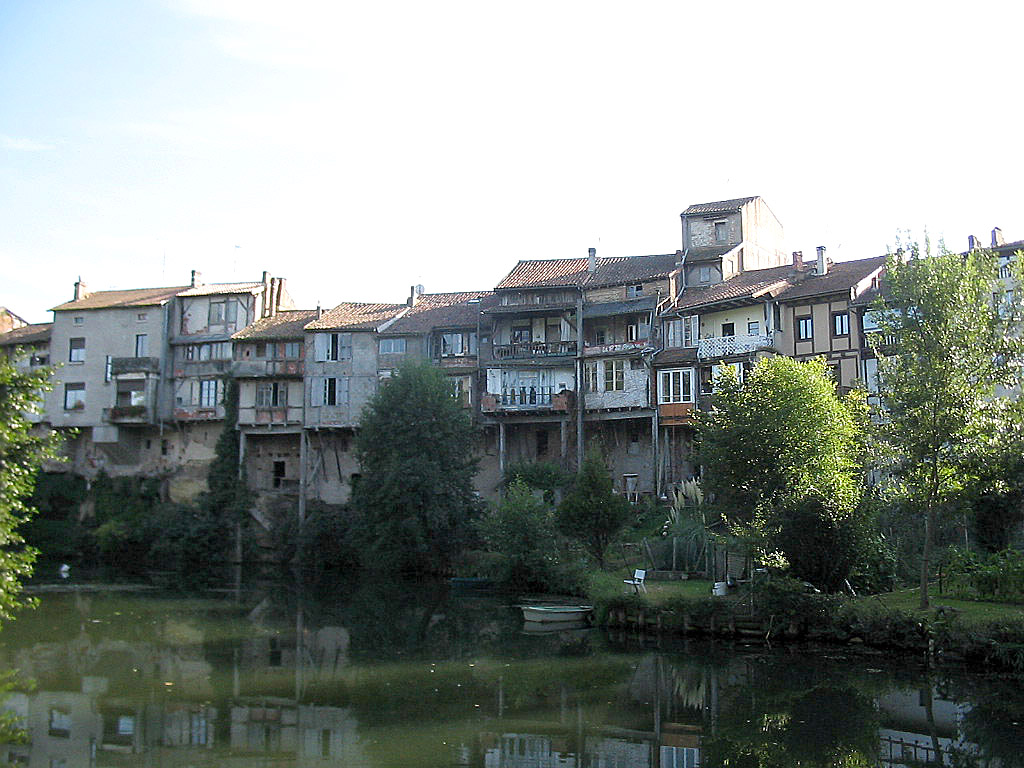 Casseneuil, Département Lot-et-Garonne, Häuser am Ufer der Lède